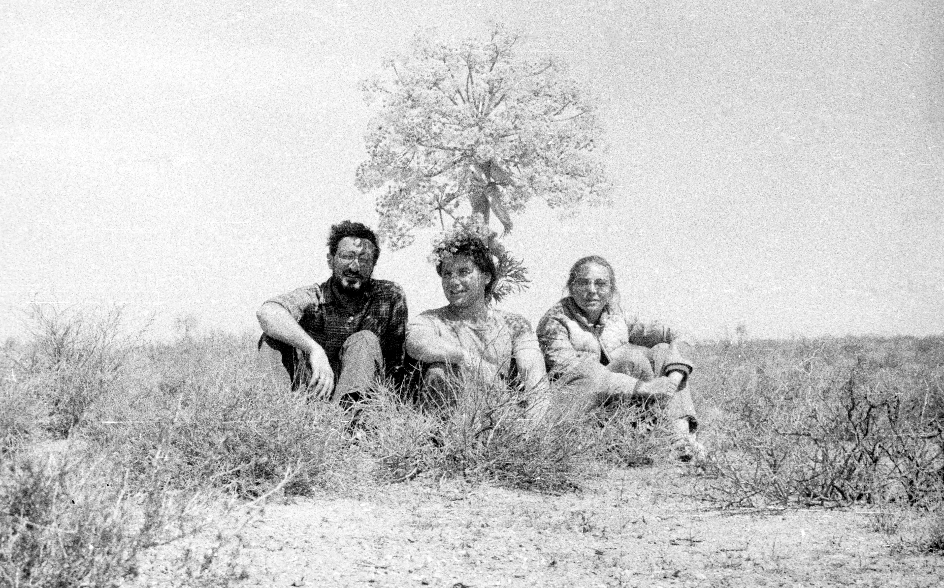 Географы под ферулой в пустыне Кызыл-Кум. Экспедиция Института географии АН СССР